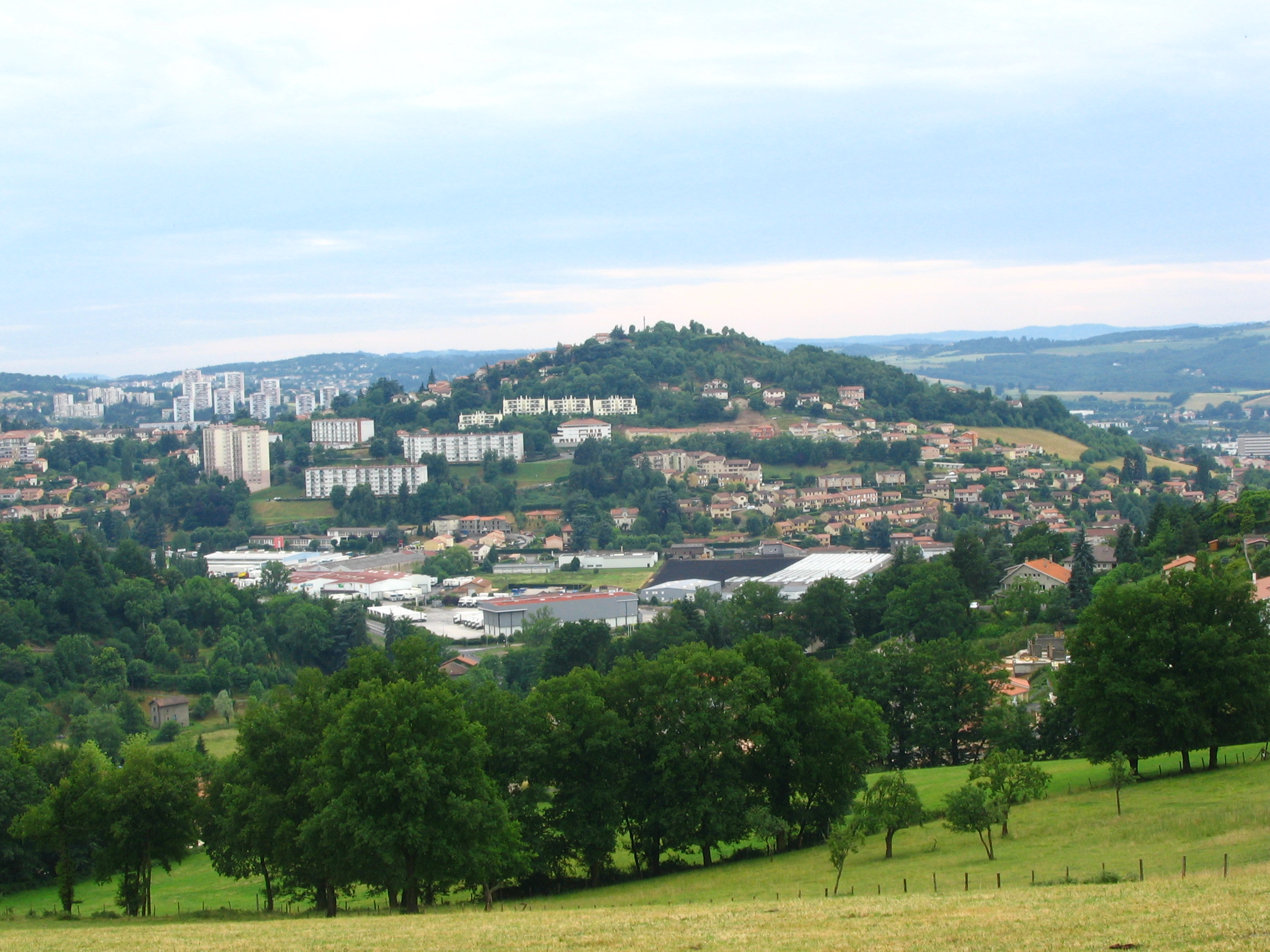 Vue de St-Priest en Jarez (Loire), depuis La Tour; on aperçoit au fond à gauche, les immeubles de la Feuilletière-Plat Haut-La Taillée, commune de Villars.